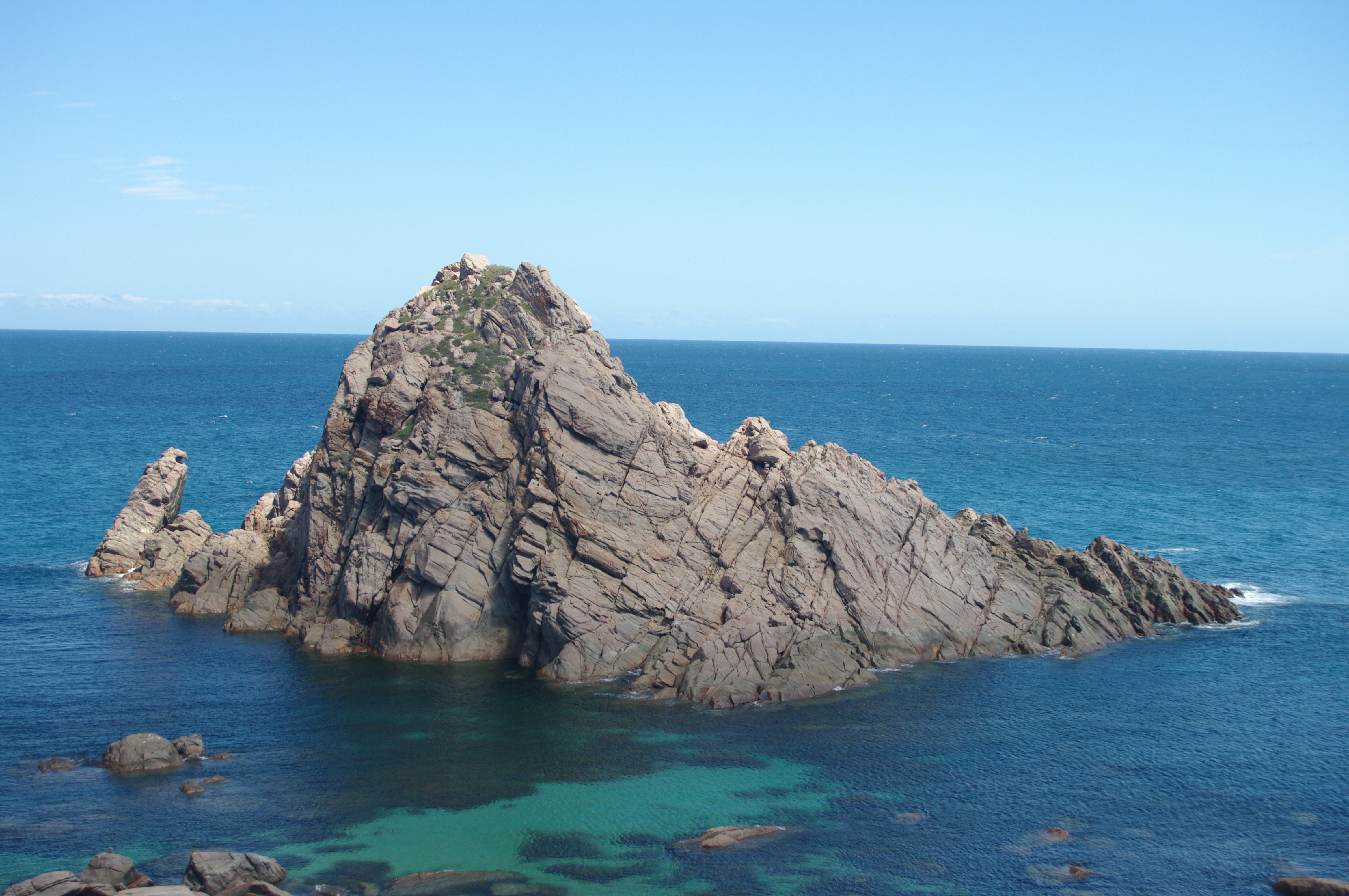 Sugarloaf Rock